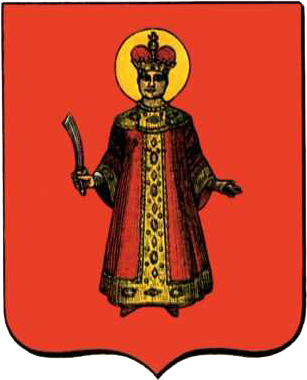 Герб города Углич (1778)